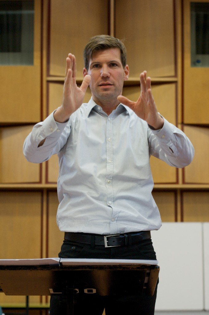 Prof. Peter Vierneisel